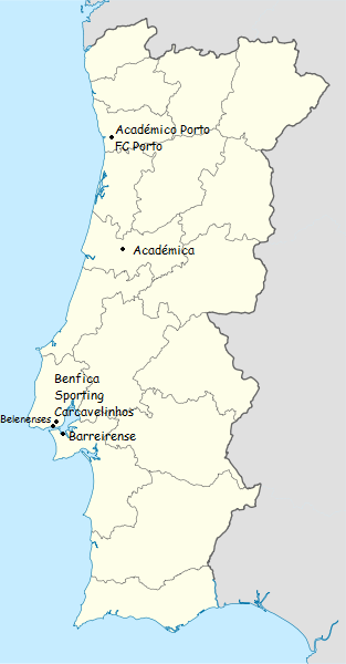 os clubes participantes do campeonato de portugal de futebol de primeira divisao de 1937-1938